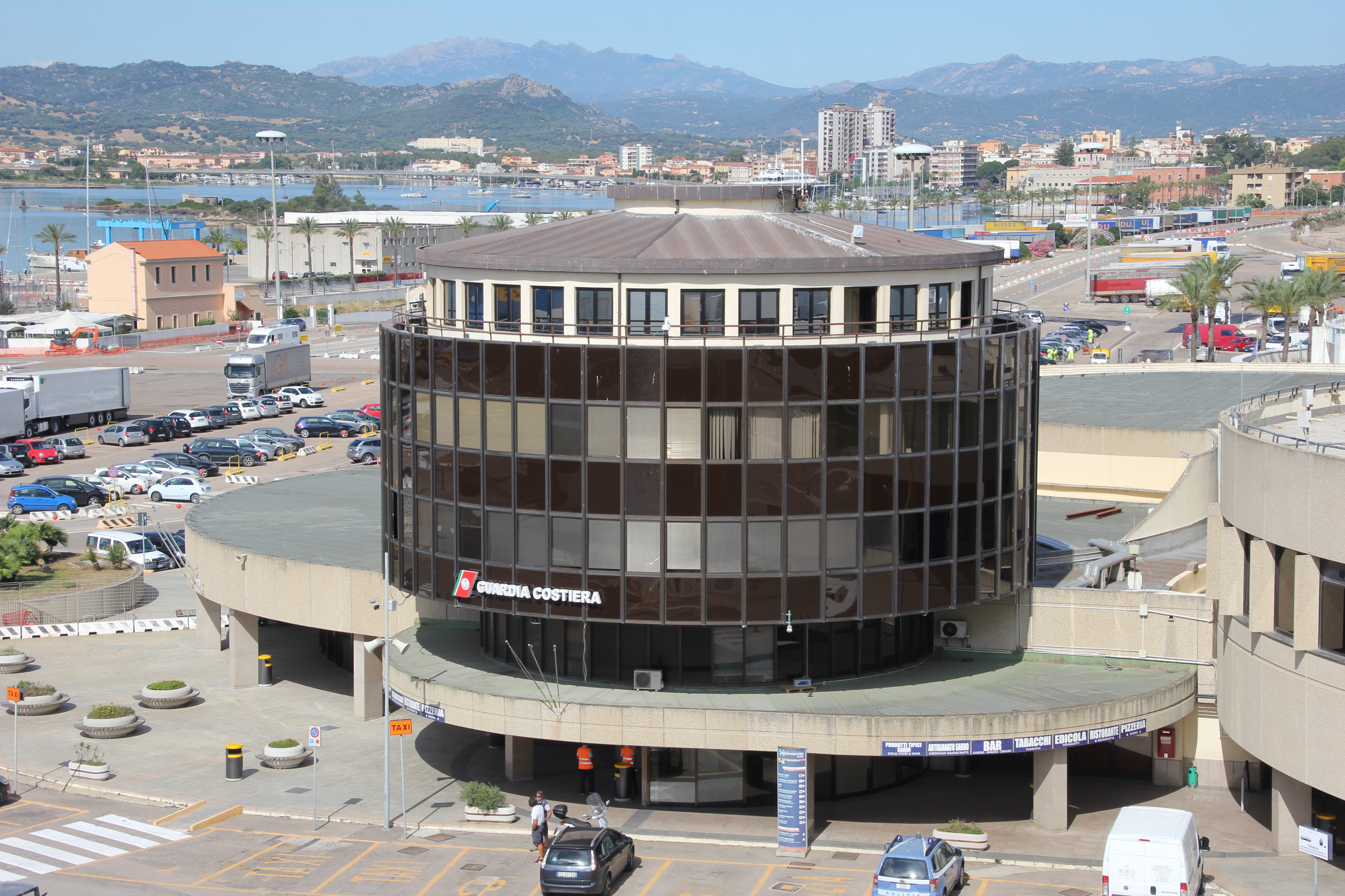 Olbia, isola di Molarotto